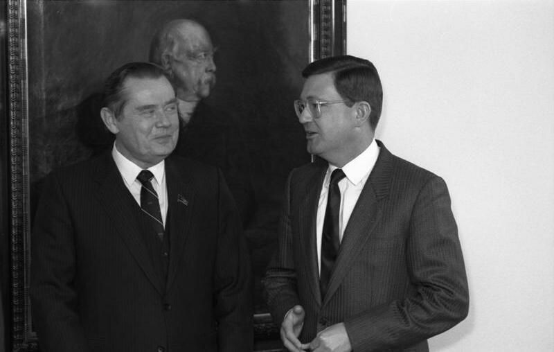 05.01.1988 Besuch des Präsidenten des Nationalen Olymischen Komitees der Sowjetunion, Marat Gramow, zugleich Vorsitzender des Komitees für Körperkultur und Sport, in Bonn. Gespräch mit Parteistaatssekretär Carl-Dieter Spranger im Bundesminsterium des Innern.